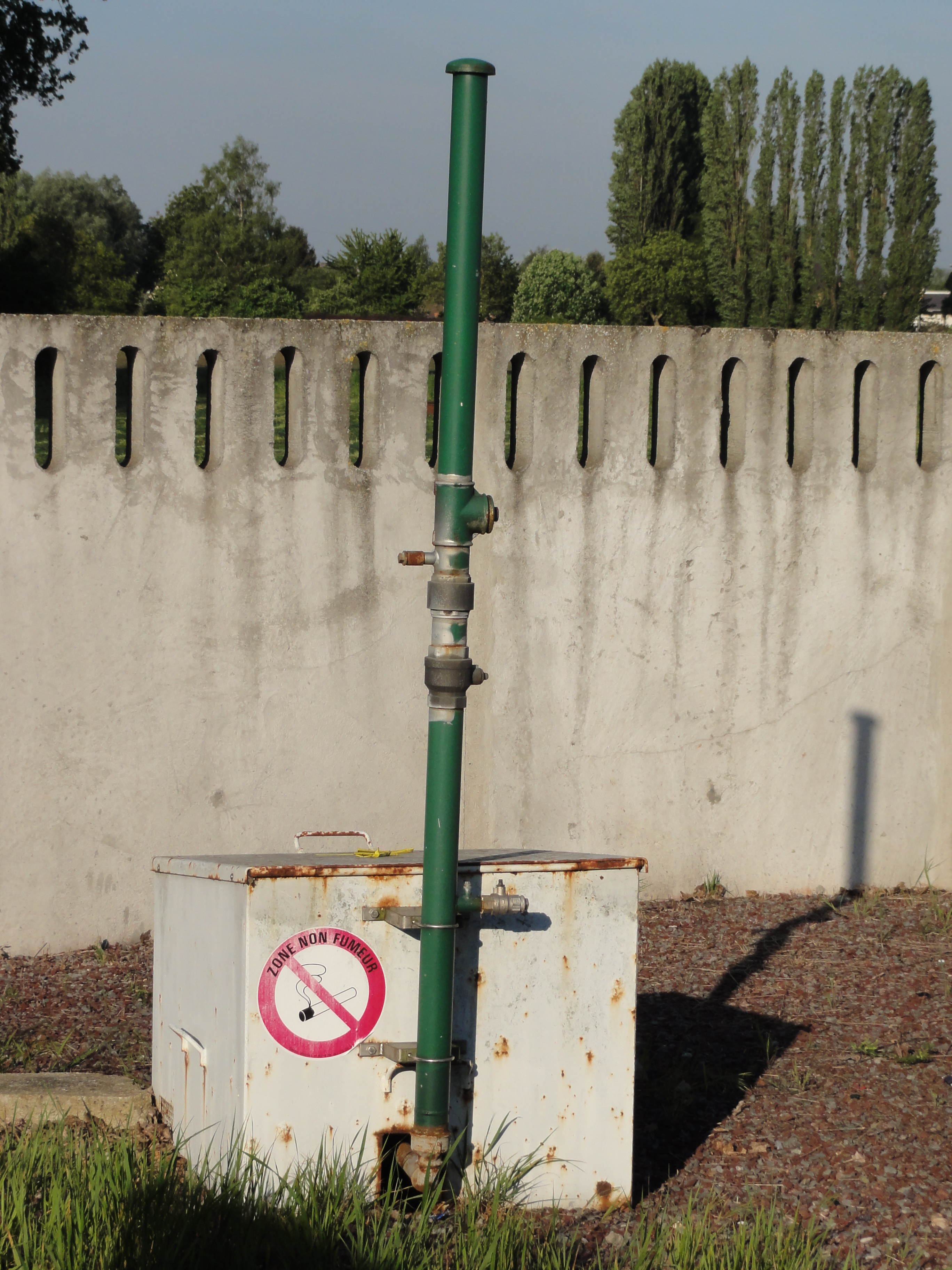 La Fosse Agache de la Compagnie des mines d'Anzin était un charbonnage constitué de deux puits situé à Fenain, Nord, Nord-Pas-de-Calais, France.